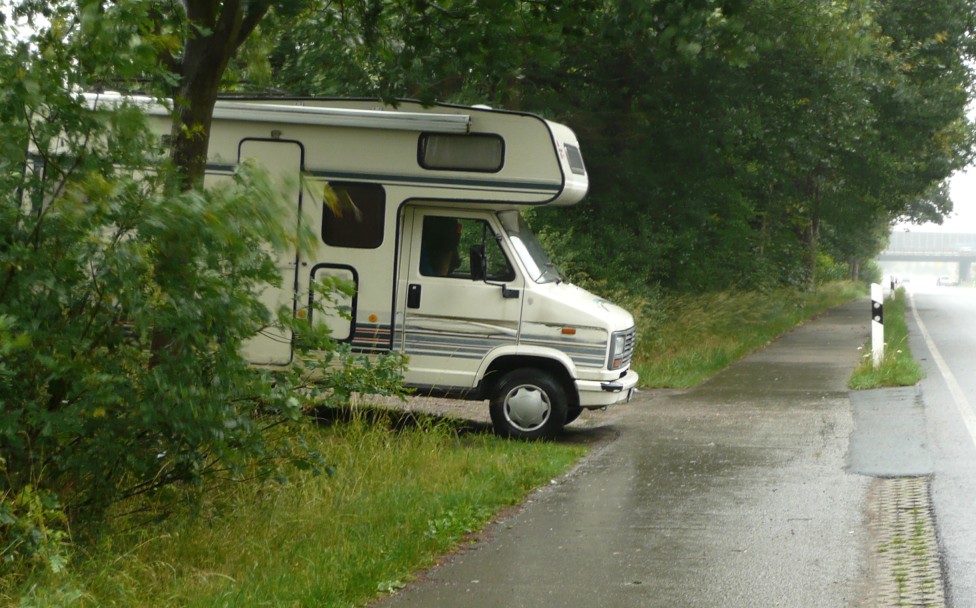 Liebesmobil Strassenrand